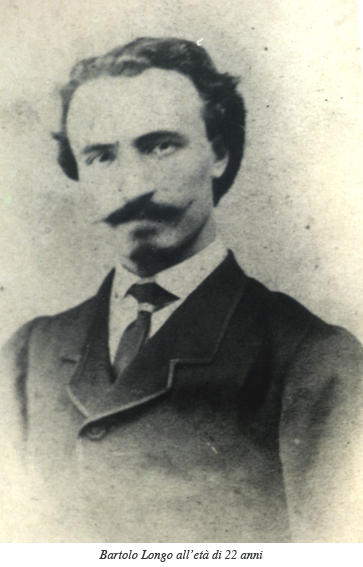 Blesed Bartolo Longo (1841-1926)